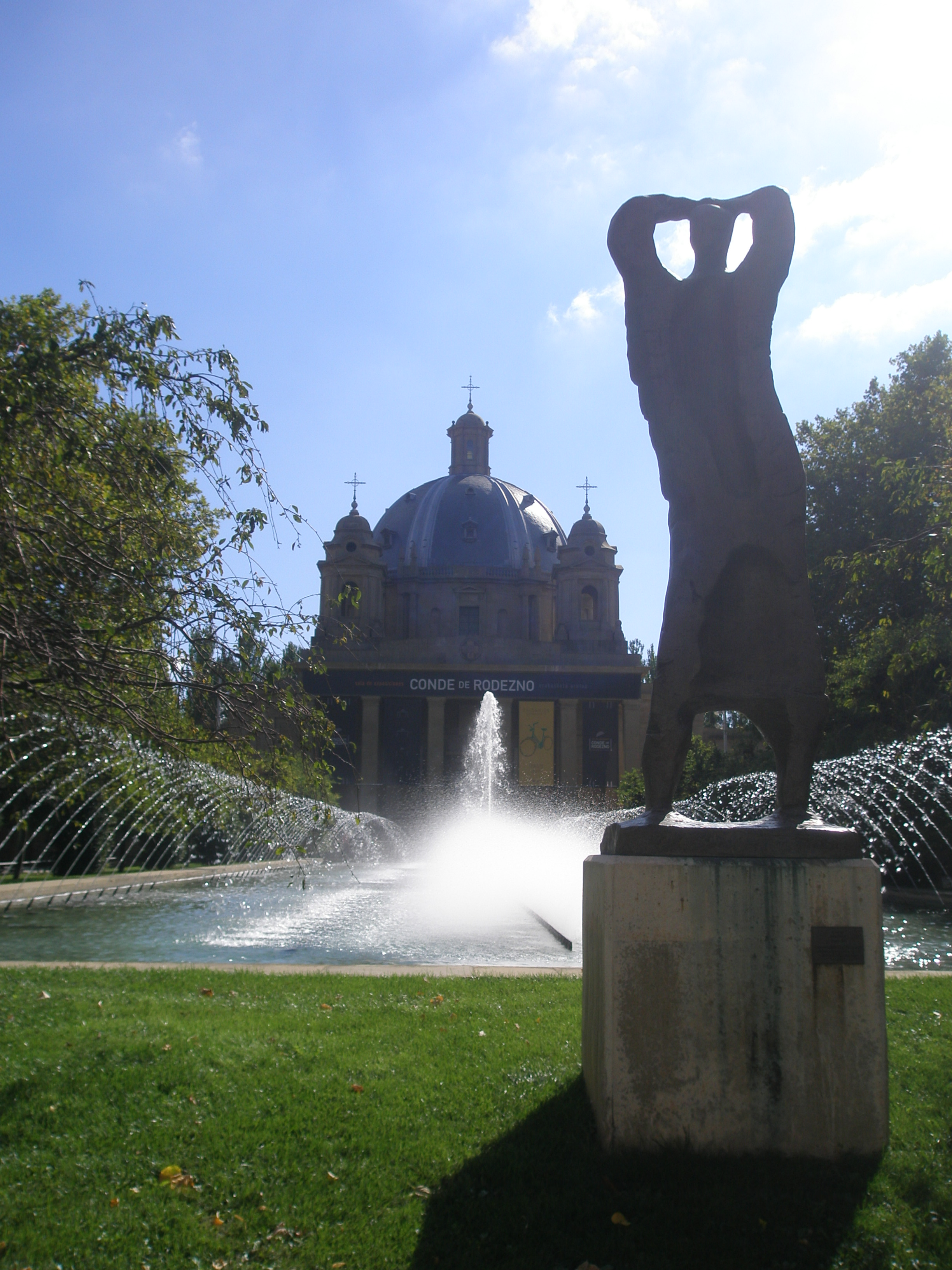 Plaza conde rodezno pamplona